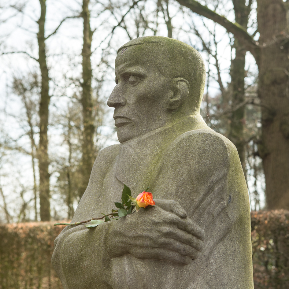 Deutscher Soldatenfriedhof Vladslo